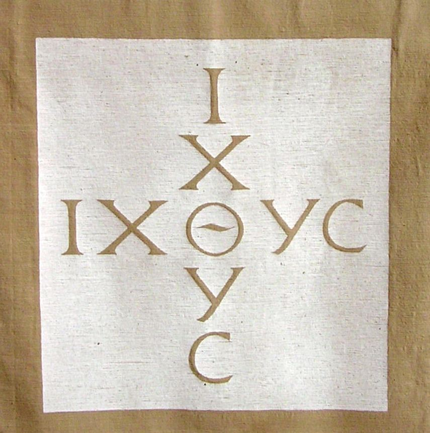 Bavnehøj Kirke, alterforhæng,antemensale